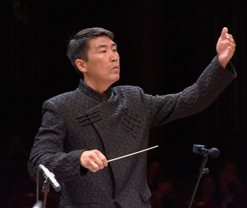 Парад дирижеров 2018 г.Белгород